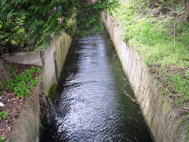 Ruisseau Le Bief à Chilly-Mazarin (91)